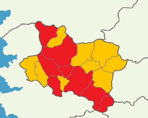 Manisa'da 2014 Türkiye cumhurbaşkanlığı seçimi